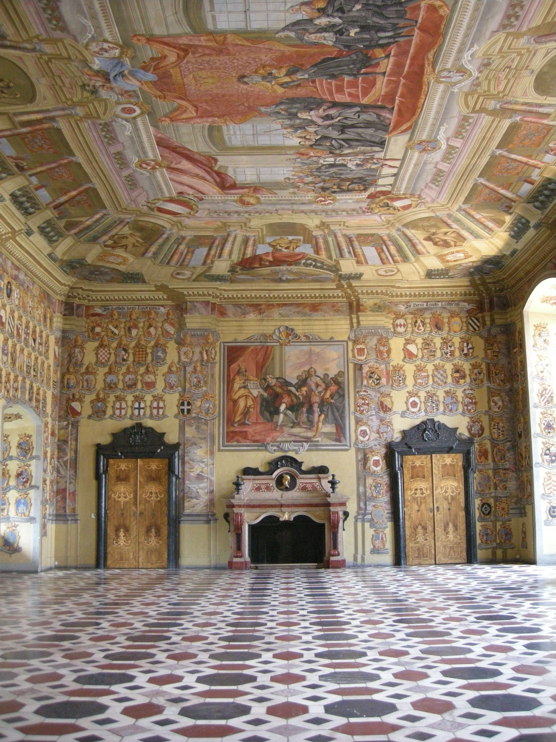 Landhaus Klagenfurt, Wappensaal